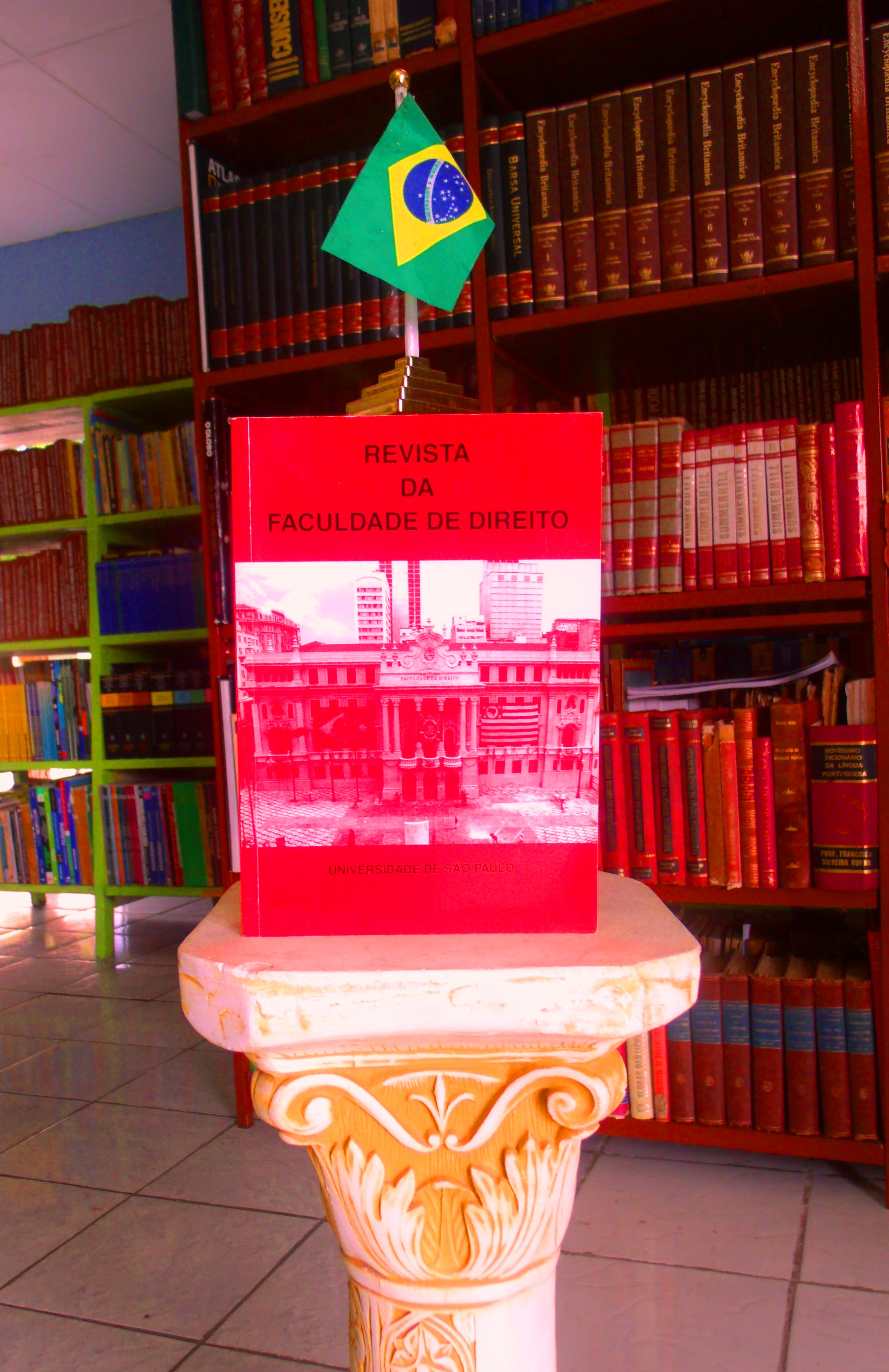 Coluna clássica encimada por uma Revista da Faculdade de Direito da Universidade de São Paulo, exposta numa biblioteca municipal no Piauí por um colecionador.